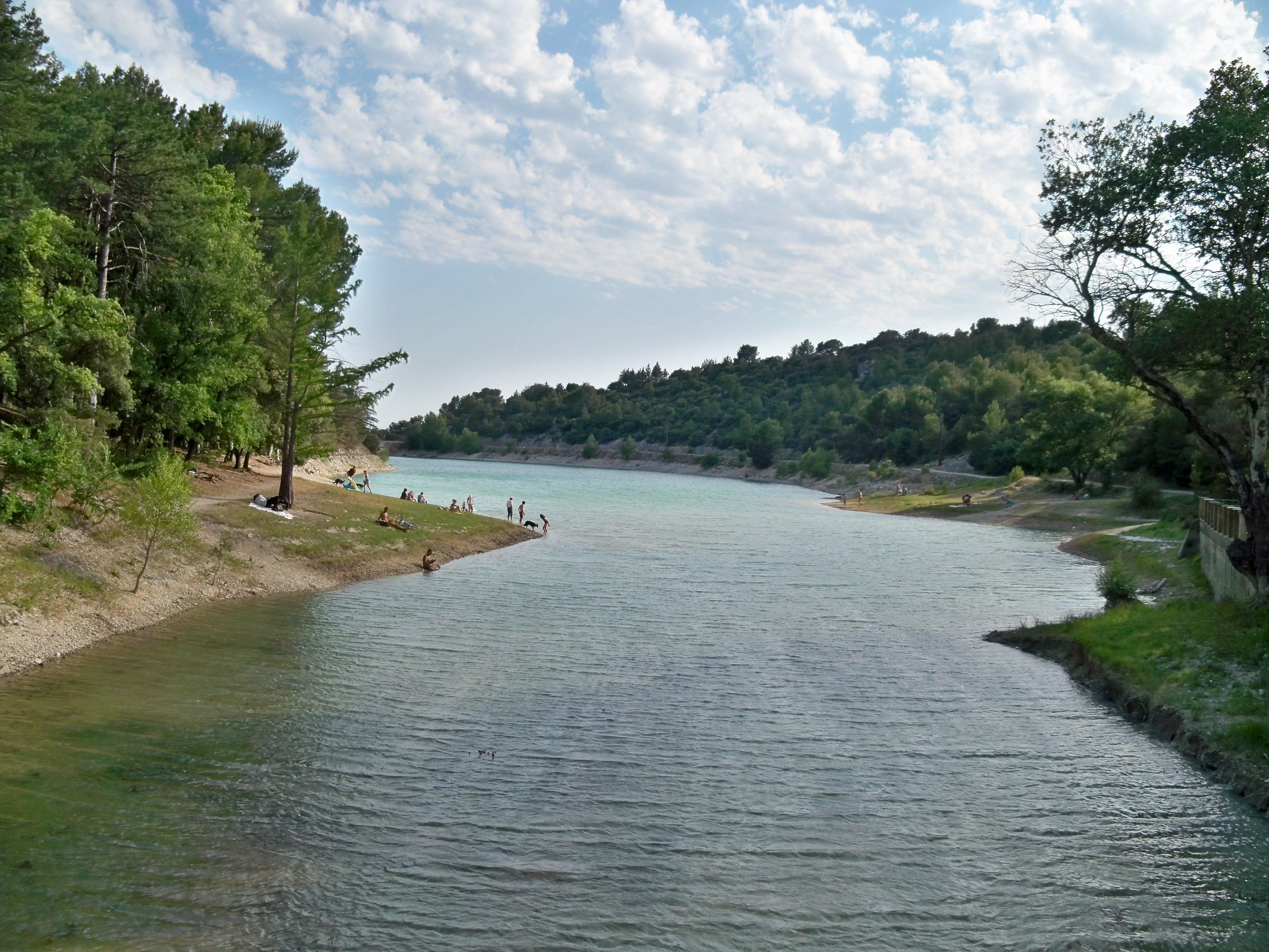 Lac du Paty, Caromb, Vaucluse, France